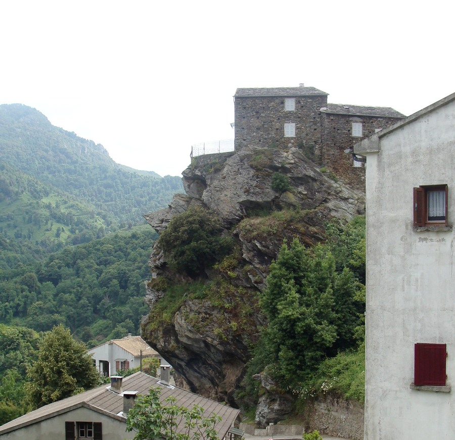 Maisons sur le Muntichju, village de Pietra-di-Verde.